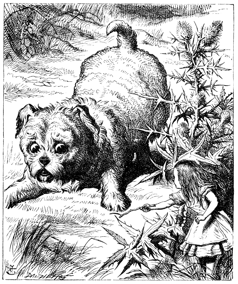 Illustration d'origine (1865), par John Tenniel (28 février 1820 – 25 février 1914), du roman de Lewis Carroll, Alice au pays des merveilles.